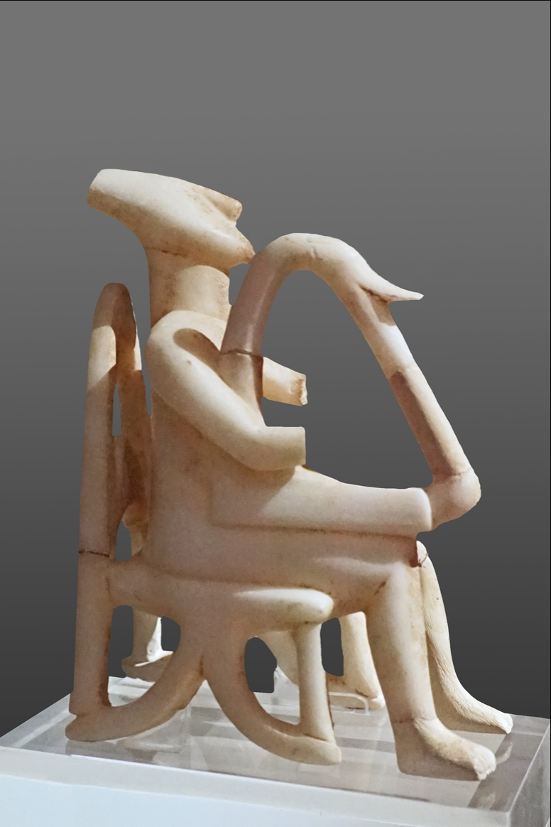 Statuette d'une figurine mâle jouant d'une lyre ou d'une harpe (trigonon) art des Cyclades Début de la période II début de l'âge du bronze île de Keros, Culture de Syros 2800-2300 av. J.-C. Marbre La statuette appartient à un groupe de musiciens dont un joue de l'aulos. Site du musée national d'archéologie (Athènes)